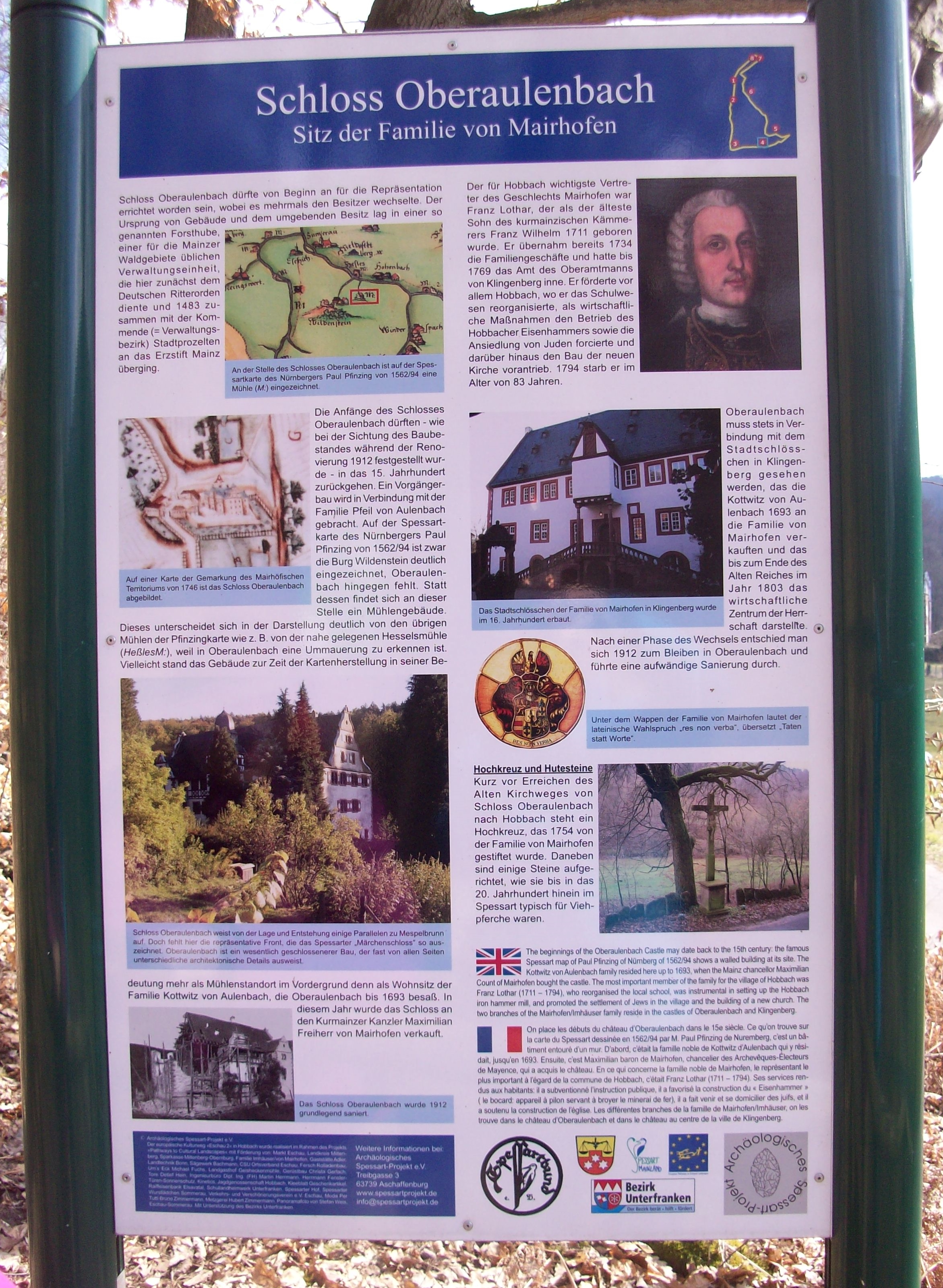 Infotafel des Spessartrundweges zum Schloss Oberaulenbach